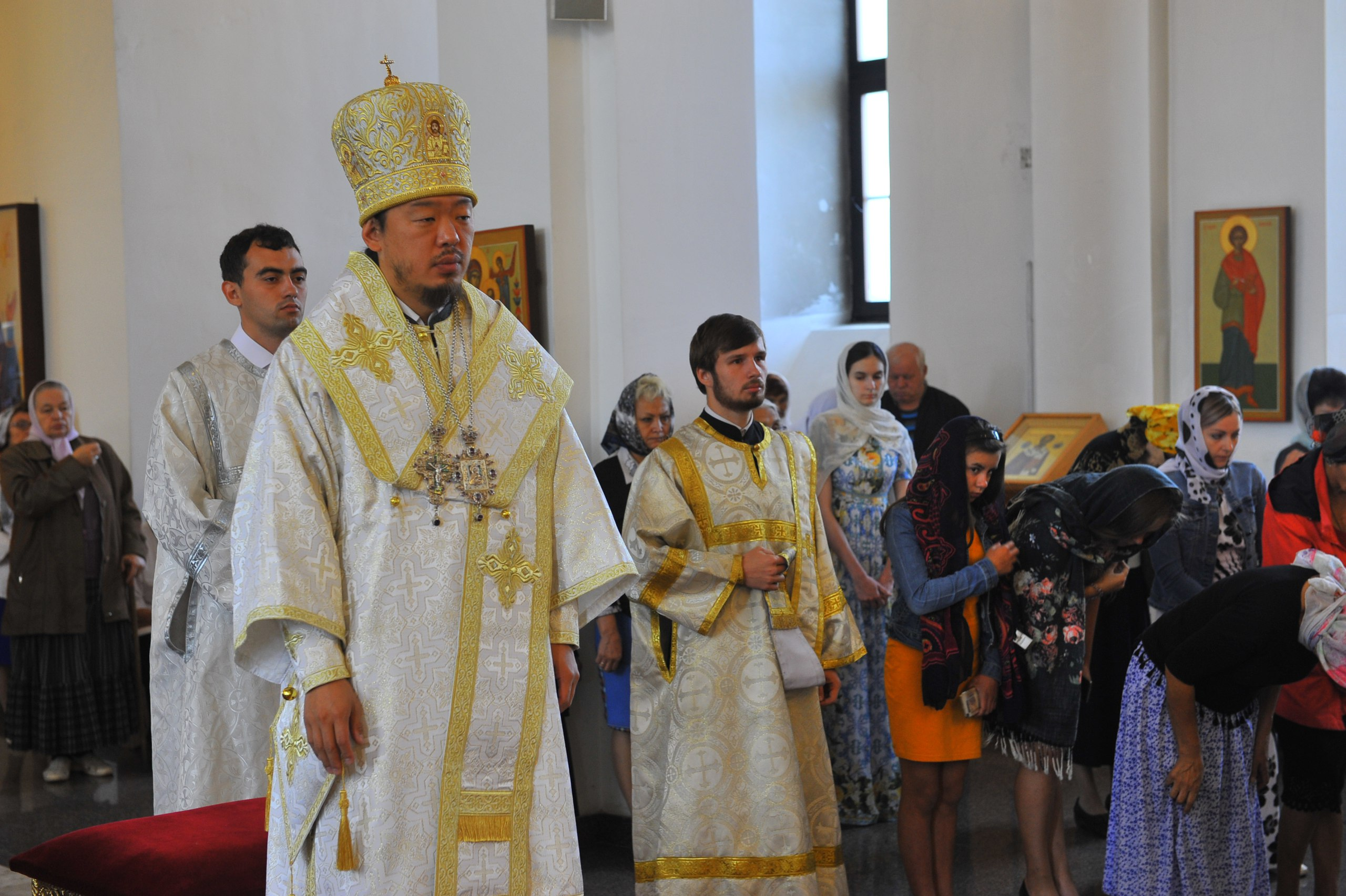 епископ Феофан (Ким) во время служения Литургии в Воскресенском кафедральном соборе г. Кызыла